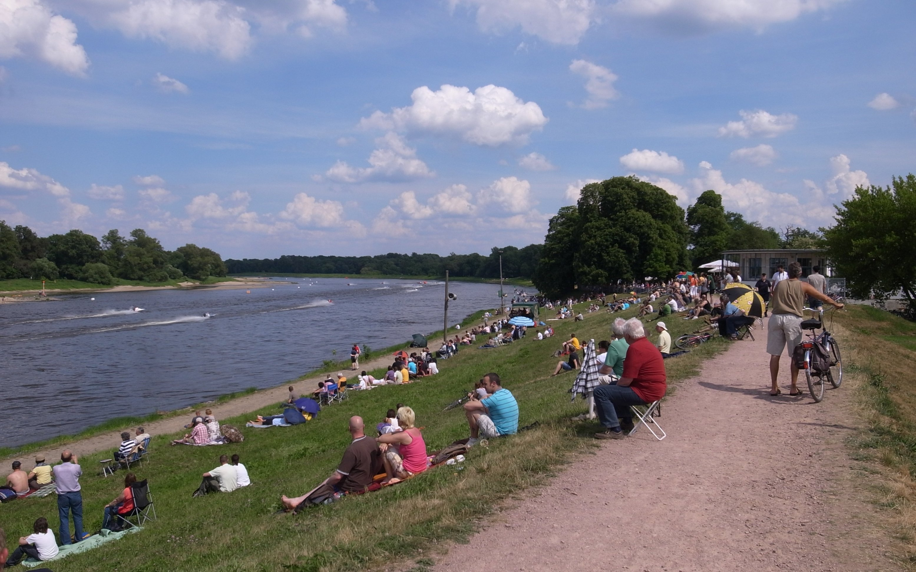 Dessau,46. Motorbootrennen am Kornhaus auf der Elbe